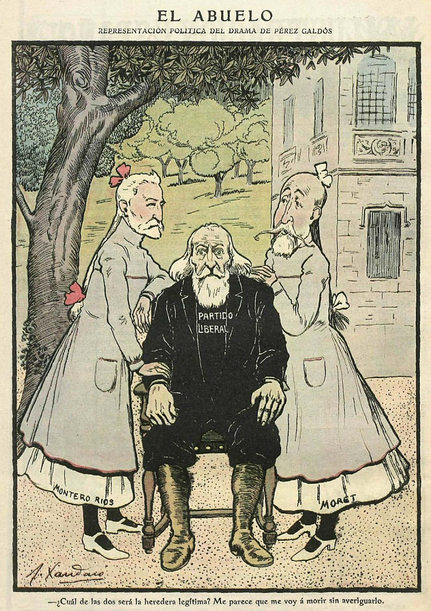 El abuelo, en la revista satírica española Gedeón.